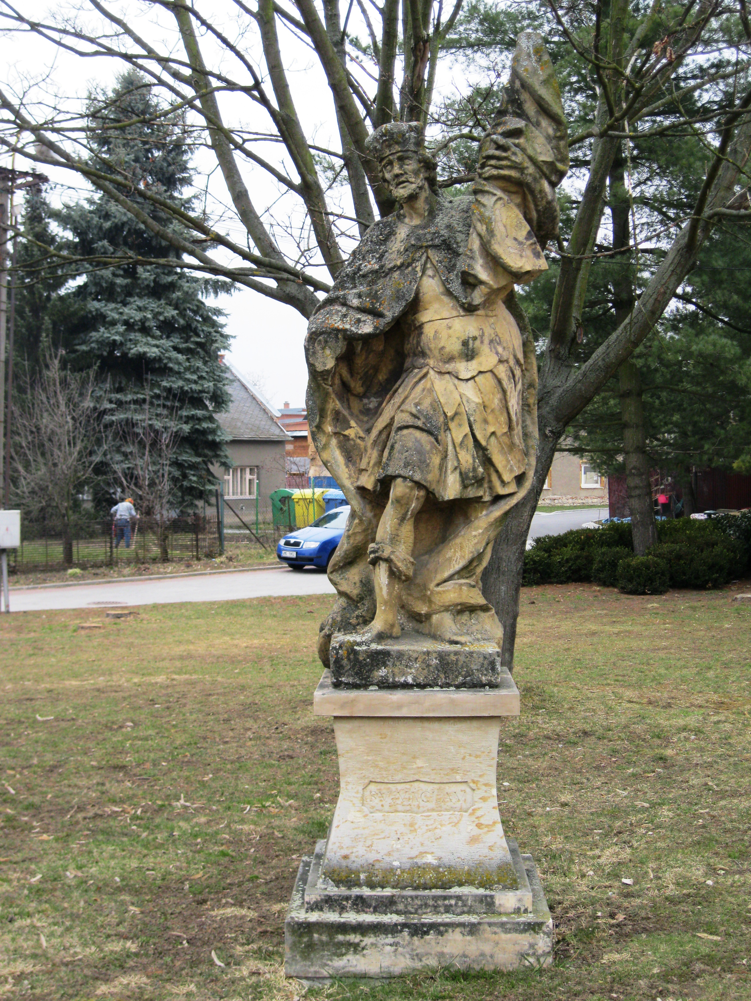 Sochy sv. Václava a sv. Kateřiny (Grygov), u kaple sv. Jana Nepomuckého, Grygov